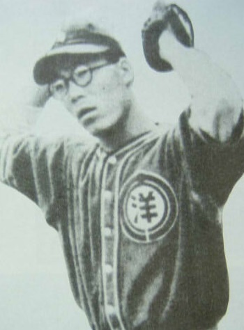 野口二郎（大洋時代）